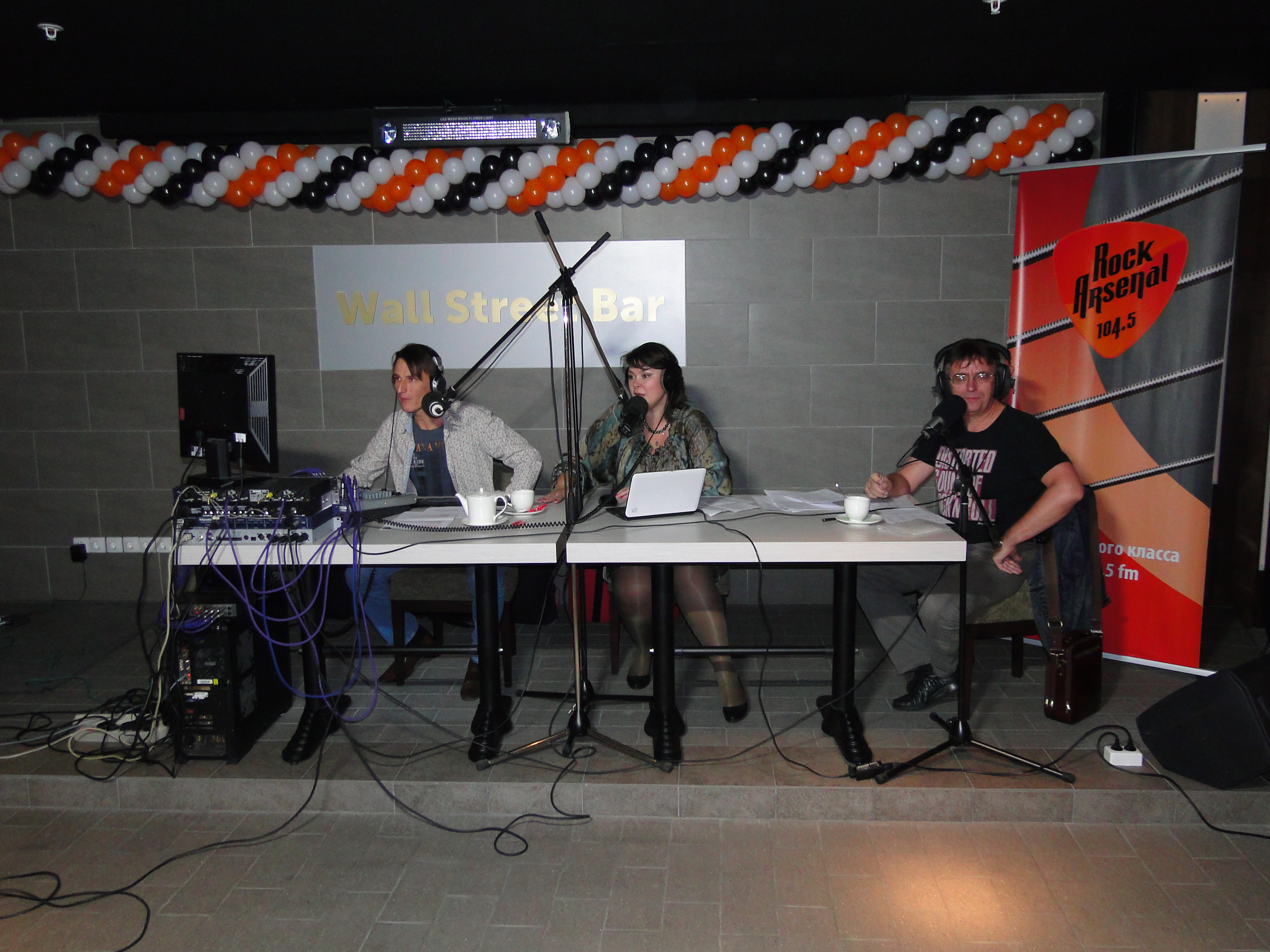 6 сентября «Rock Arsenal» на 104,5 FM (г. Екатеринбург) отметил второй день рождения «открытым» рок-н-ролльным эфиром.